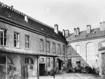 Innenhof des Palais Redern am Pariser Platz in Berlin / Court of Palais Redern in Berlin, Germany